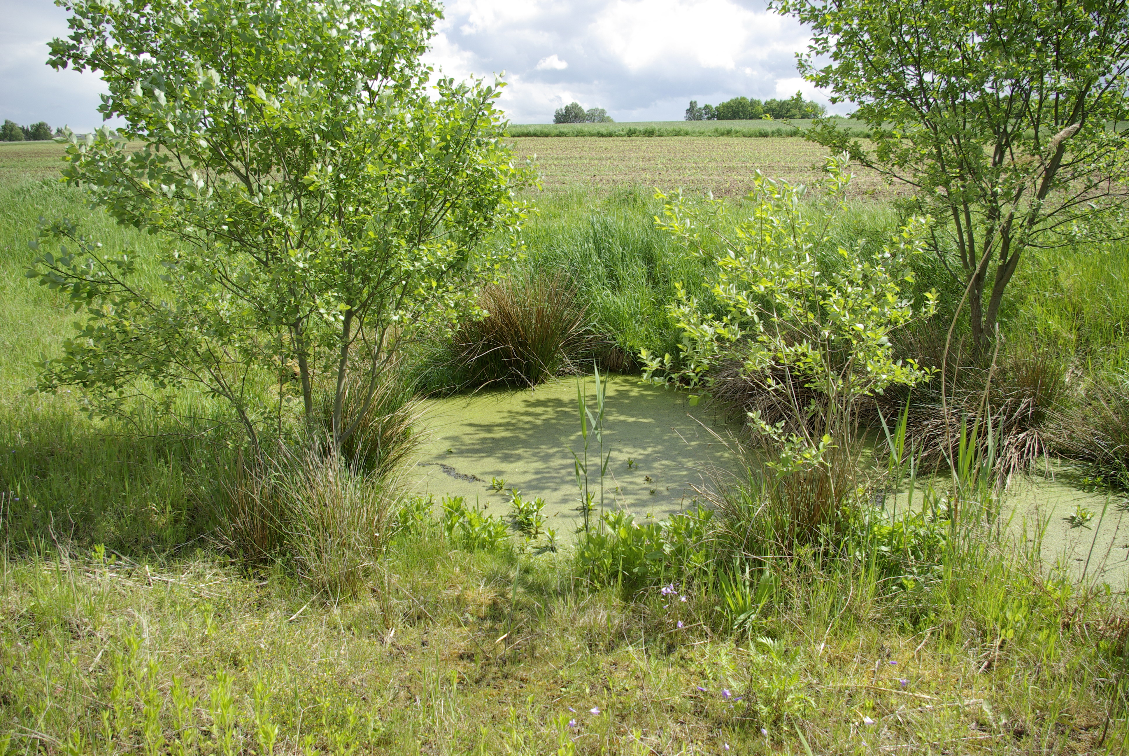 Eine Quelle des Langenaugrabens zwischen den Erlanger Stadtteilen Eltersdorf und Bruck